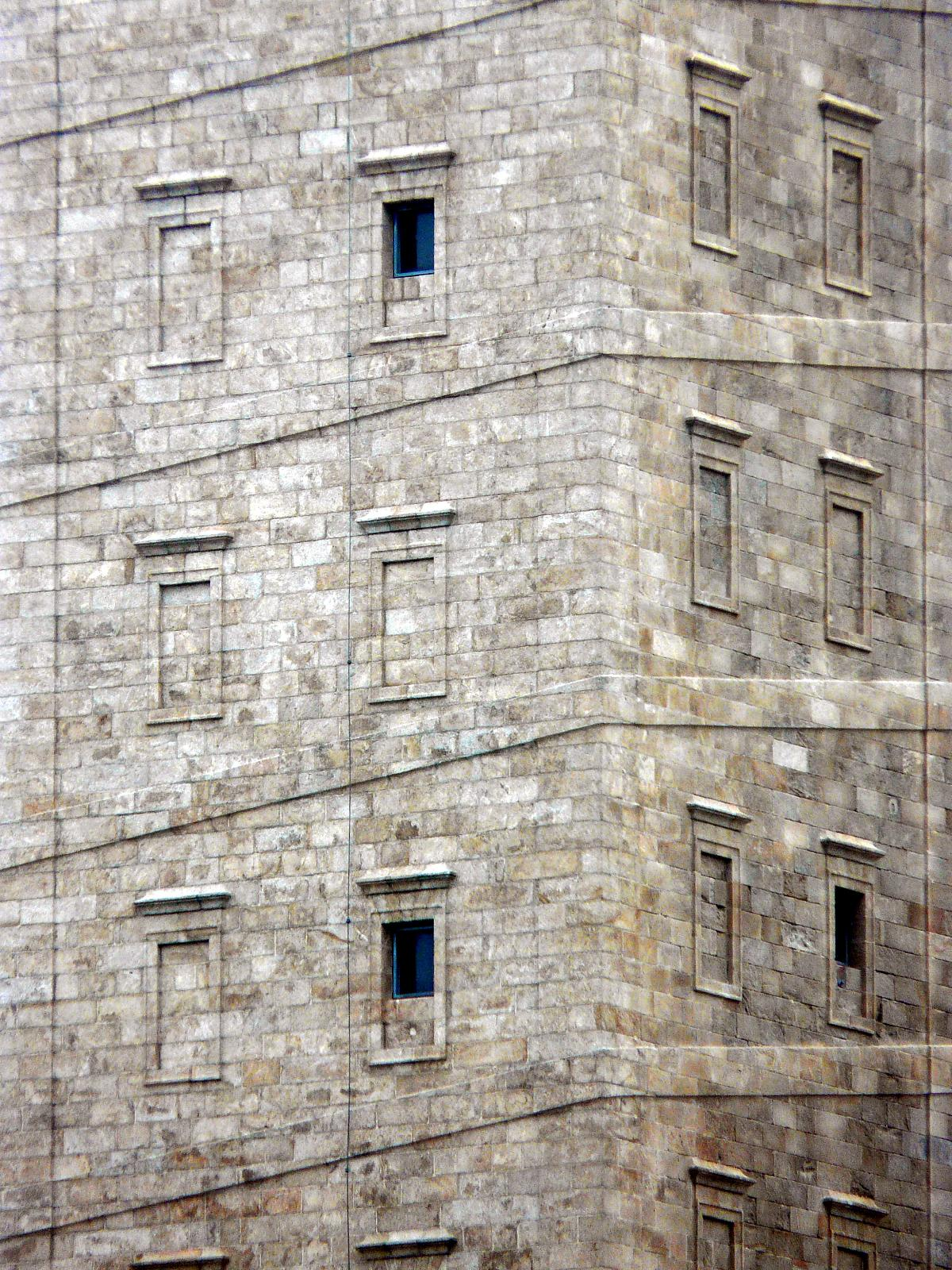 Torre de Hércules, ventás do pasado